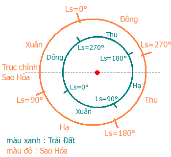 Kinh độ Mặt Trời và mùa tại Trái Đất và Sao Hỏa. Tự vẽ bởi người truyền lên. Dựa theo lịch thiên văn của [1].